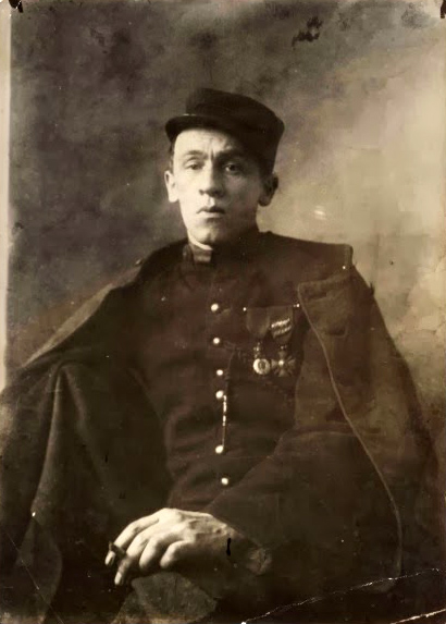 Photographie de Blaise Cendrars en uniforme de la Légion étrangère, prise le dimanche de Pâques 1916, quelques mois après son amputation du bras droit.